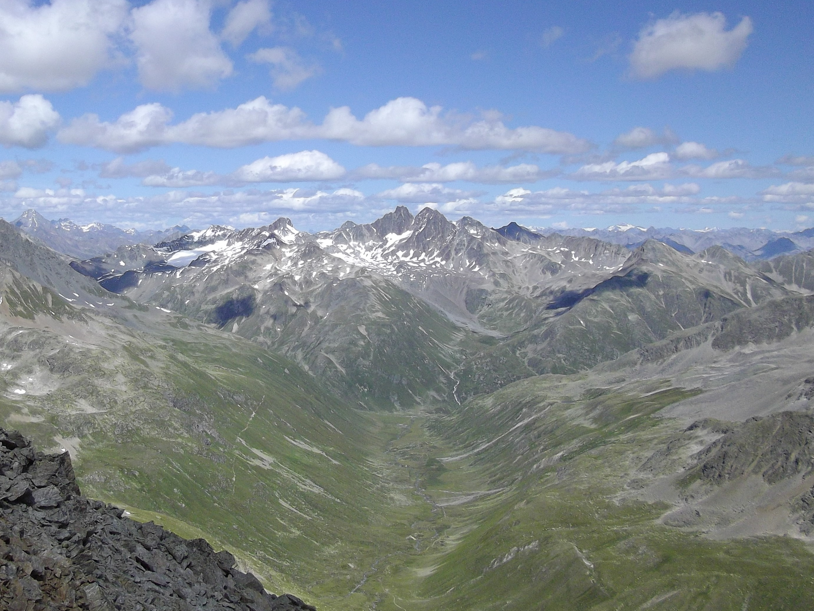 Piz Grialetsch, Piz Vadret und Piz Vadret Pitschen (v.l.n.r.) über dem Val Funtauna vom Piz Forun aus gesehen.